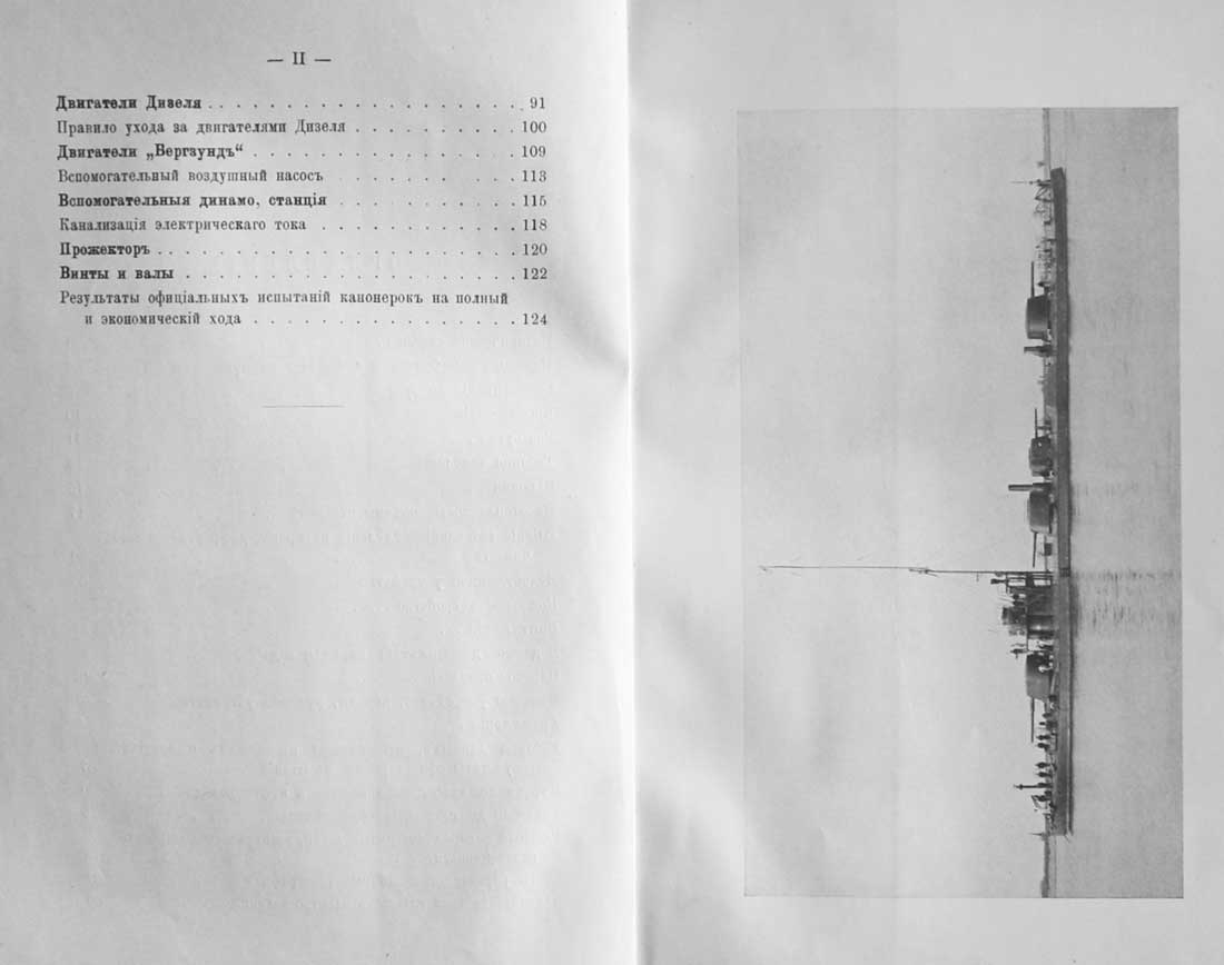 Лист книги Башенная канонерская лодка типа "Шквал"